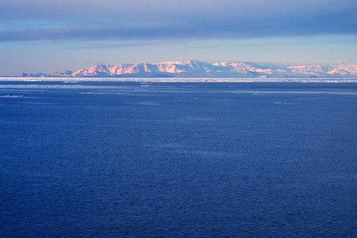 Rossmeer